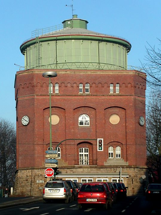 Beschreibung: Wasserturm an der Steeler Straße in Essen. Fotografiert von der Kurfürstenstraße aus. Quelle: selbst fotografiert Datum: 01. Februar 2006